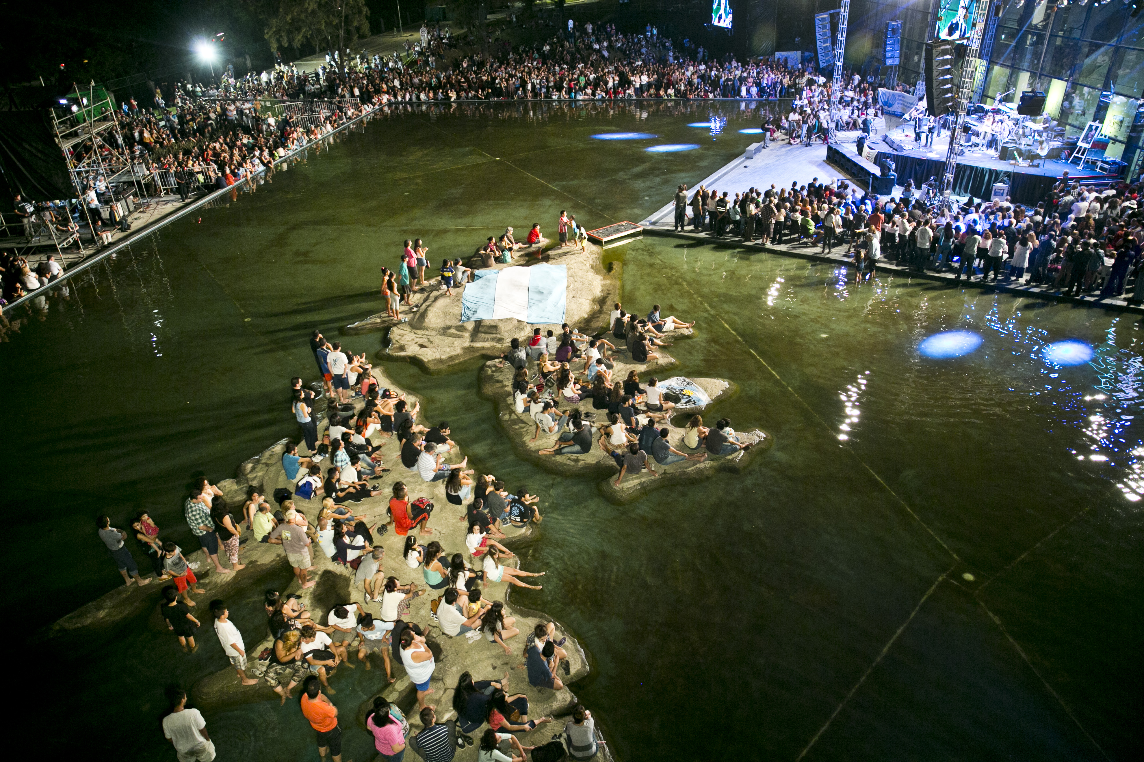 Buenos Aires, 2 de abril de 2015 – El Ministerio de Cultura de la Nación conmemoró el Día del Veterano y de los Caídos en la Guerra de Malvinas con el encuentro "Arte por la Paz" en el Museo Malvinas e Islas del Atlántico Sur, con las actuaciones de Raúl Porchetto, León Gieco, Fabiana Cantilo y más invitados. Fotos: Mauro Rico/ Ministerio de Cultura de la Nación